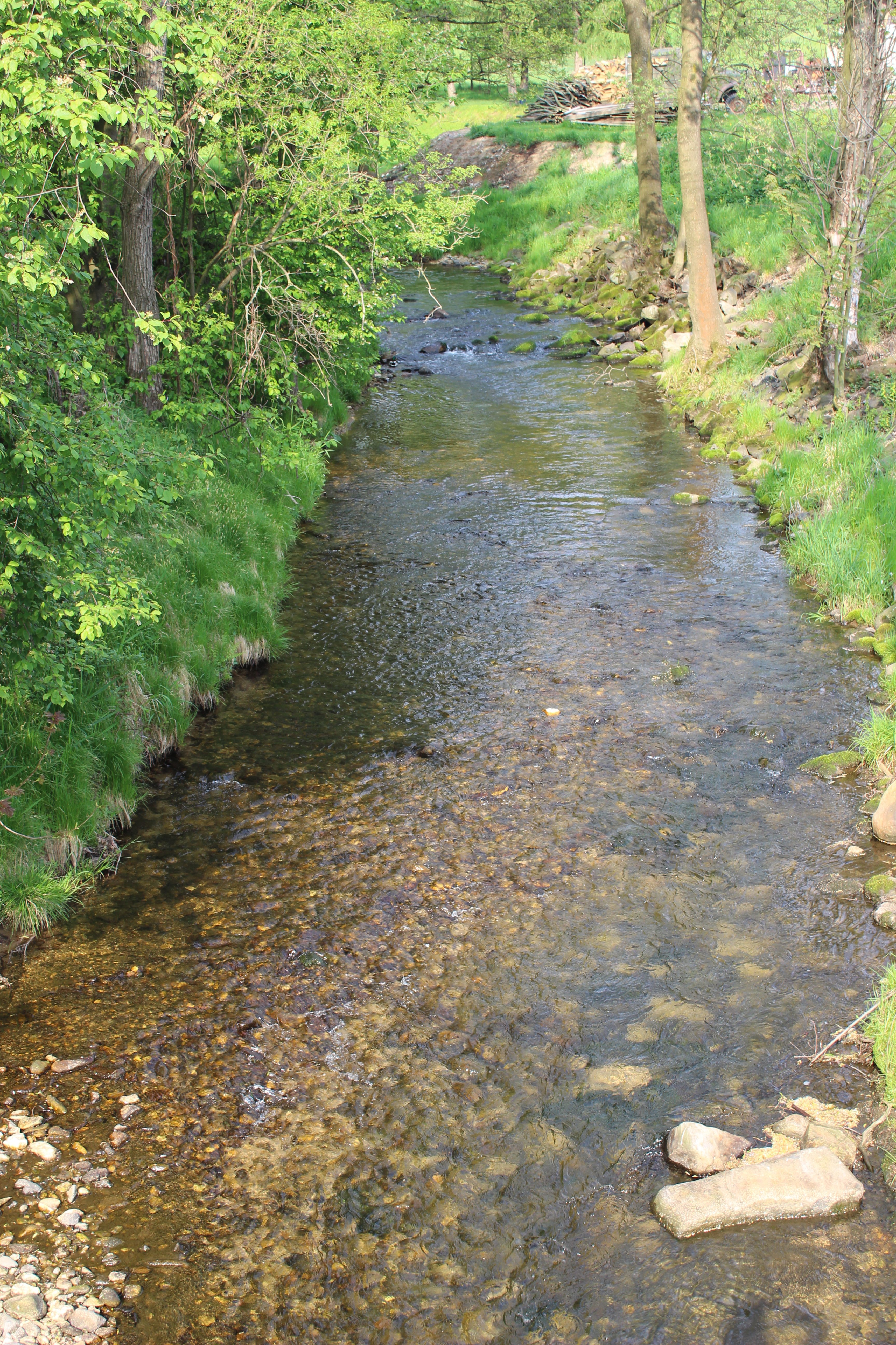 Pohled na říčku Lomnici proti proudu toku severním směrem od Smědé.